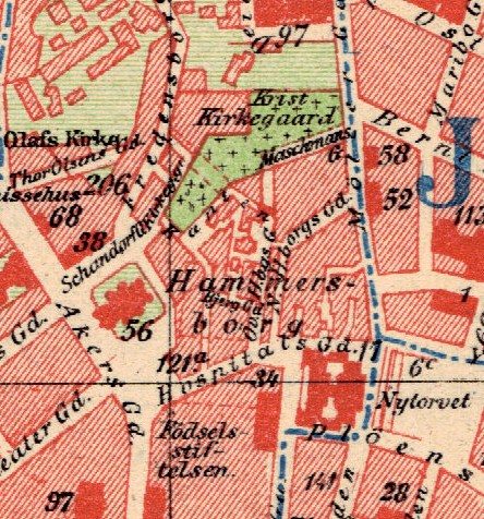 Hammersborg, Oslo.